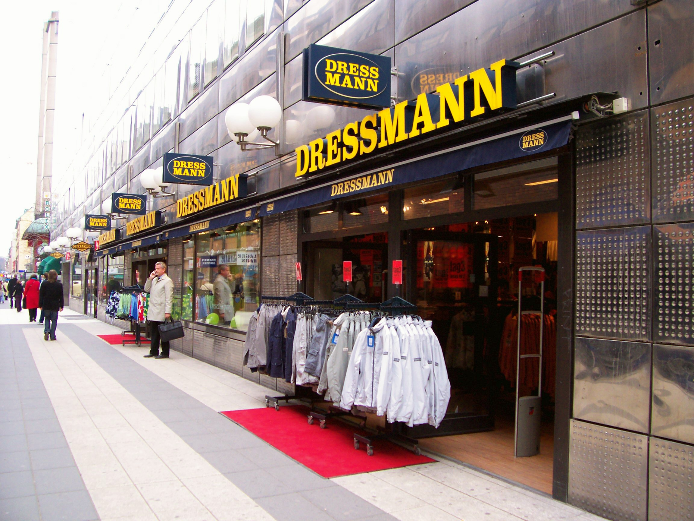 Dressmann shop on Drottninggatan in Stockholm, Sweden.